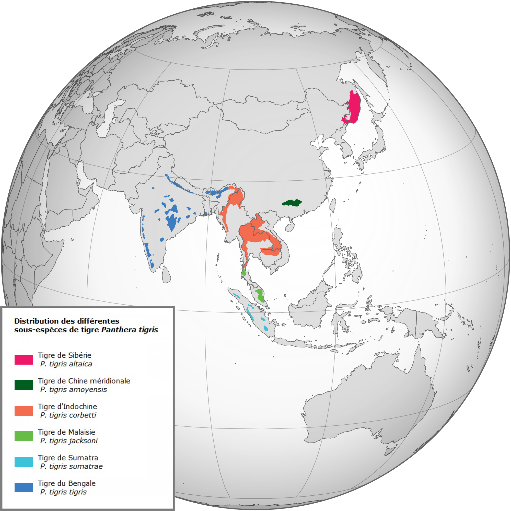 Carte contenant la distribution de toutes les sous-espèces de tigre encore existantes, avec l'ajout des frontières nationales. Carte originale créée par Zuanzuanfuwa